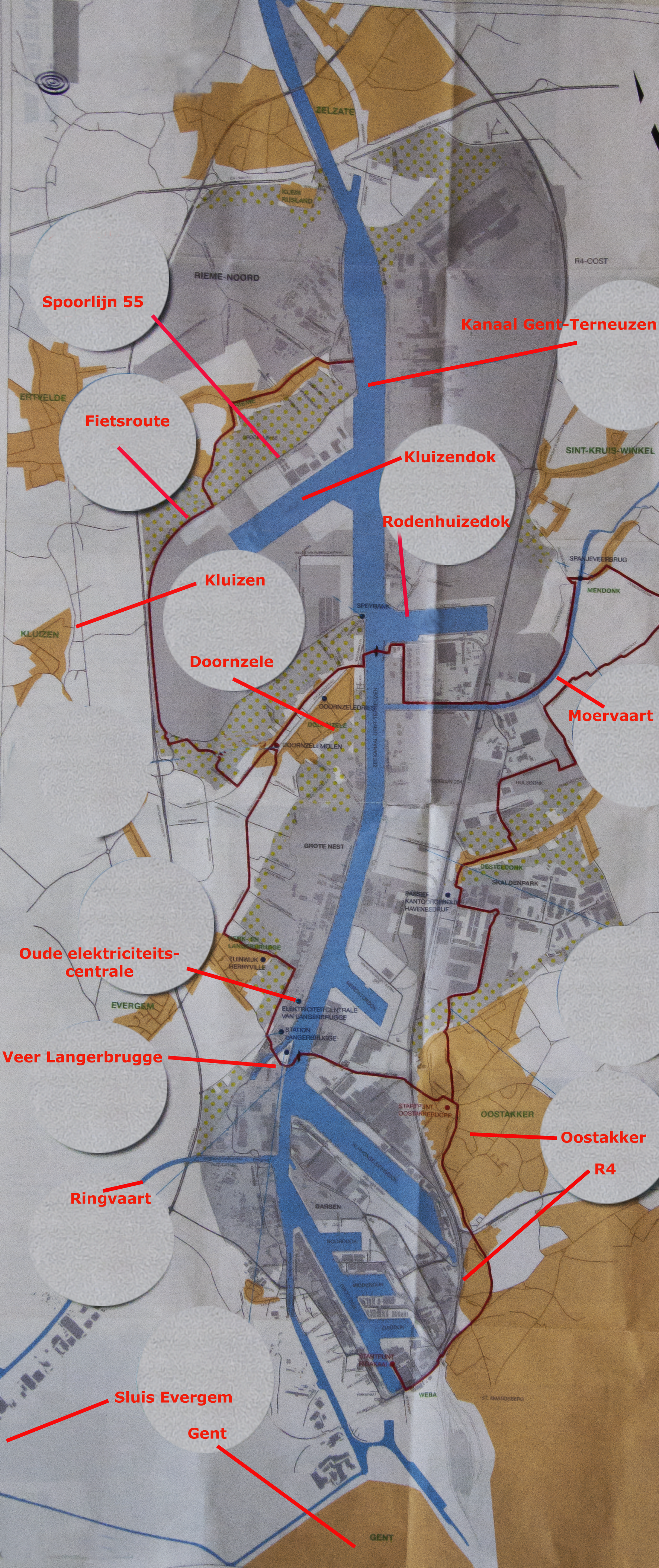 Kaart van de haven van Gent, met eigen aanpassingen en aanvullingen, op basis van een kaart uitgegeven door "Project Gentse Kanaalzone" (samenwerkingsverband gemeente,Evergem, Zelzate, Gent, de Vlaamse overheid, provincie Oost-Vlaanderen en het Havenbedrijf Gent